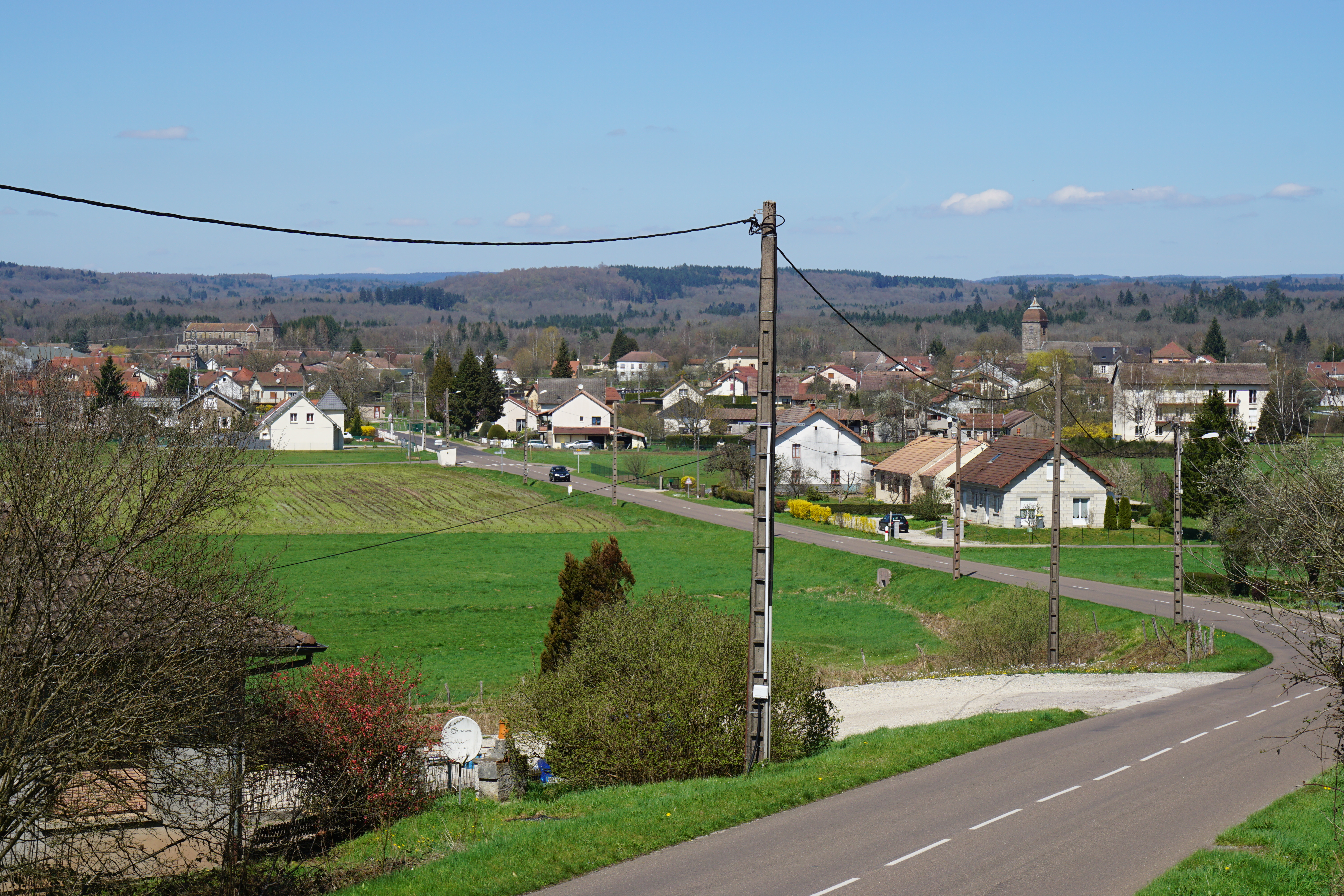 Les villages de Mélisey et de Saint-Barthélemy en Haute-Saône.